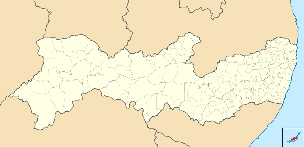 Microrregião de Fernando de Noronha